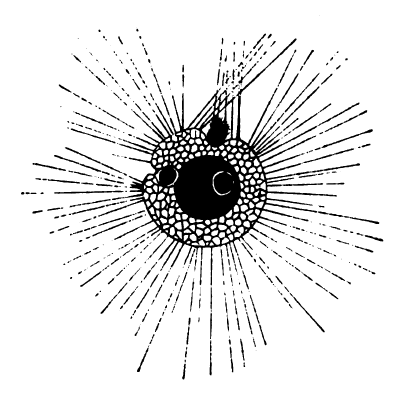 Sonnentierchen (Actinophrys sol) bei der Verdauung